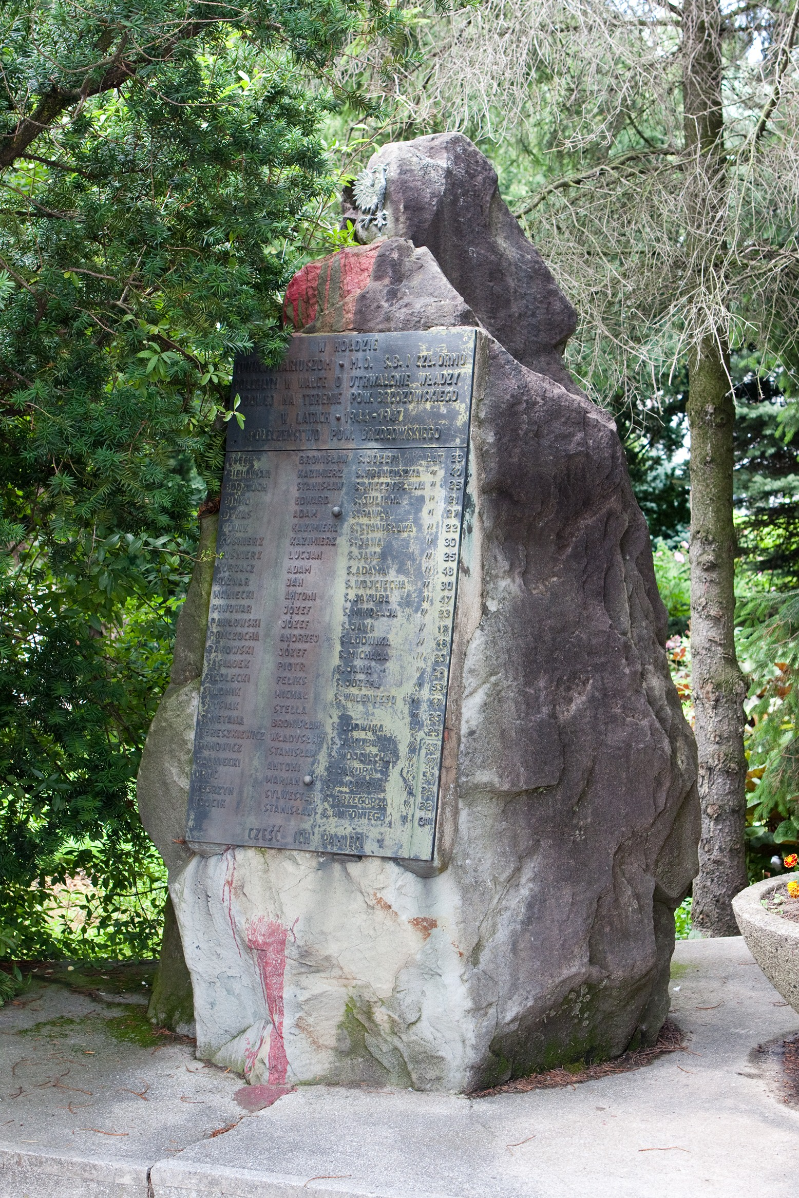 Głaz ku czci funkcjonariuszy MO, SB i członków ORMO na rynku w Brzozowie.